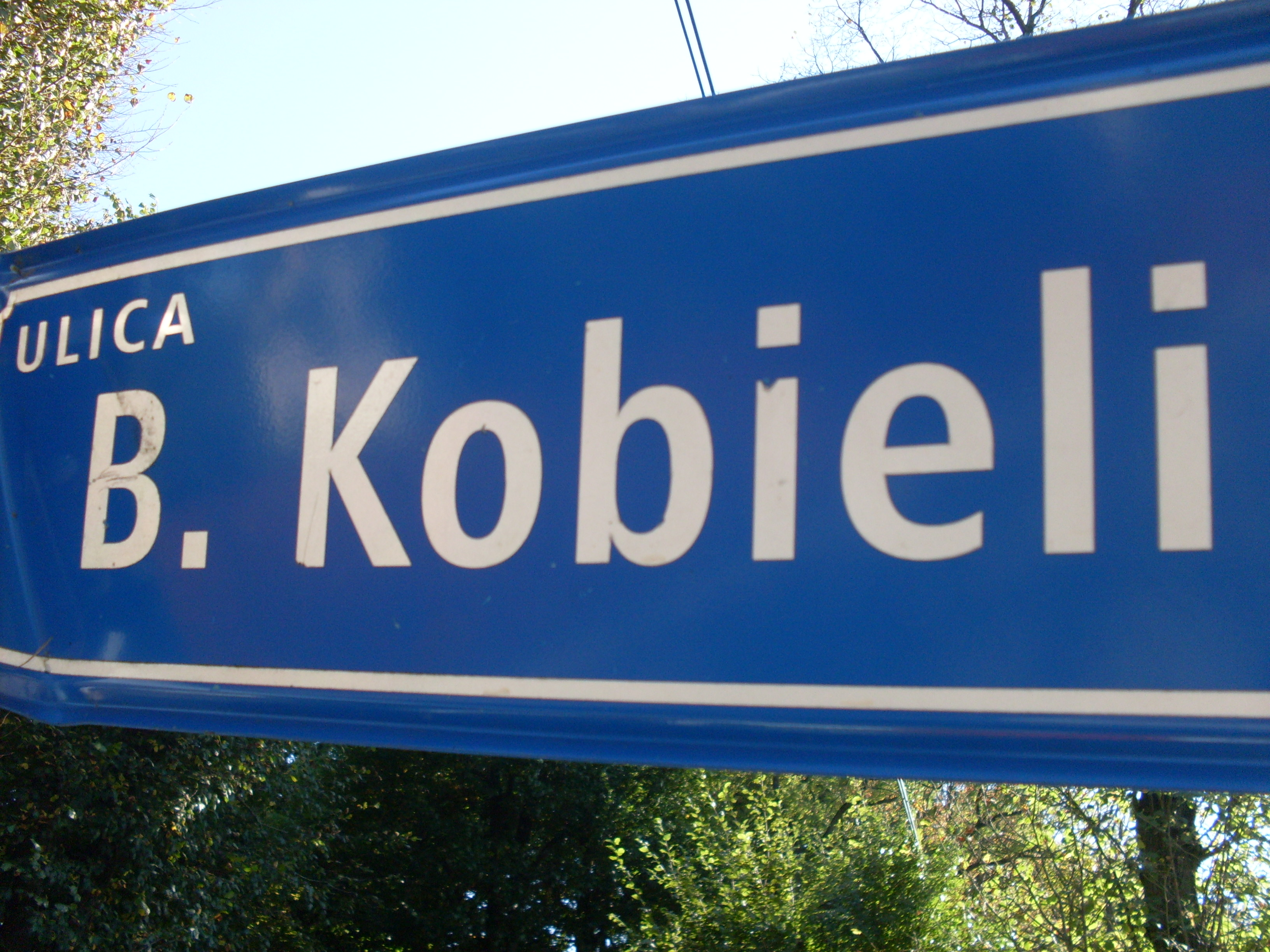 Tenczynek.Tablica ul B. Kobieli